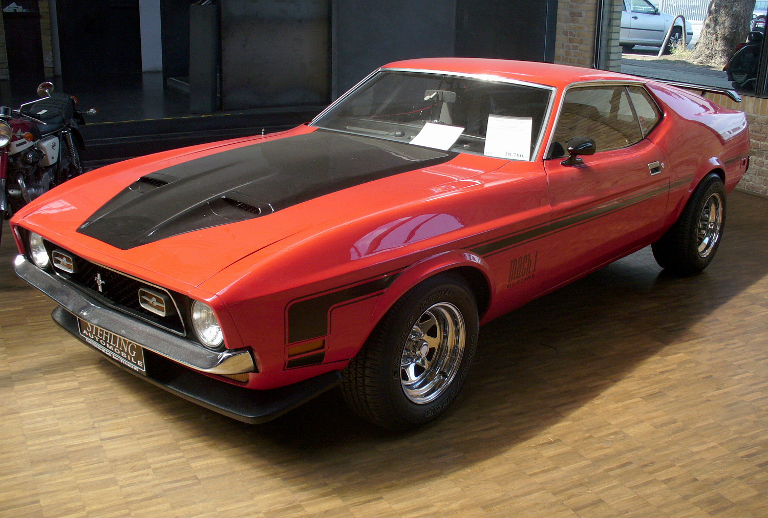 Ford Mustang Mach I